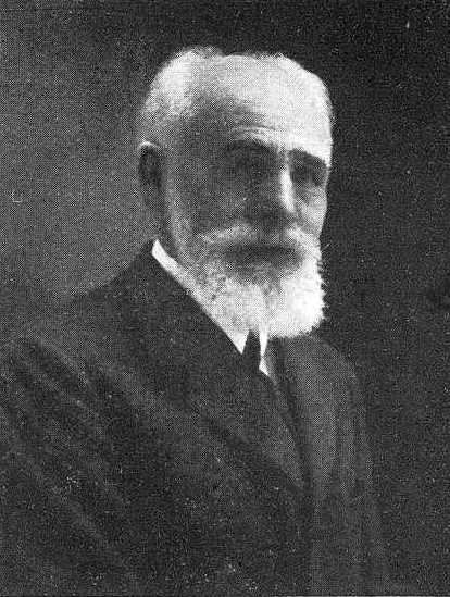 Ángel Senra Fernández, fotografía en Vida Gallega 1931